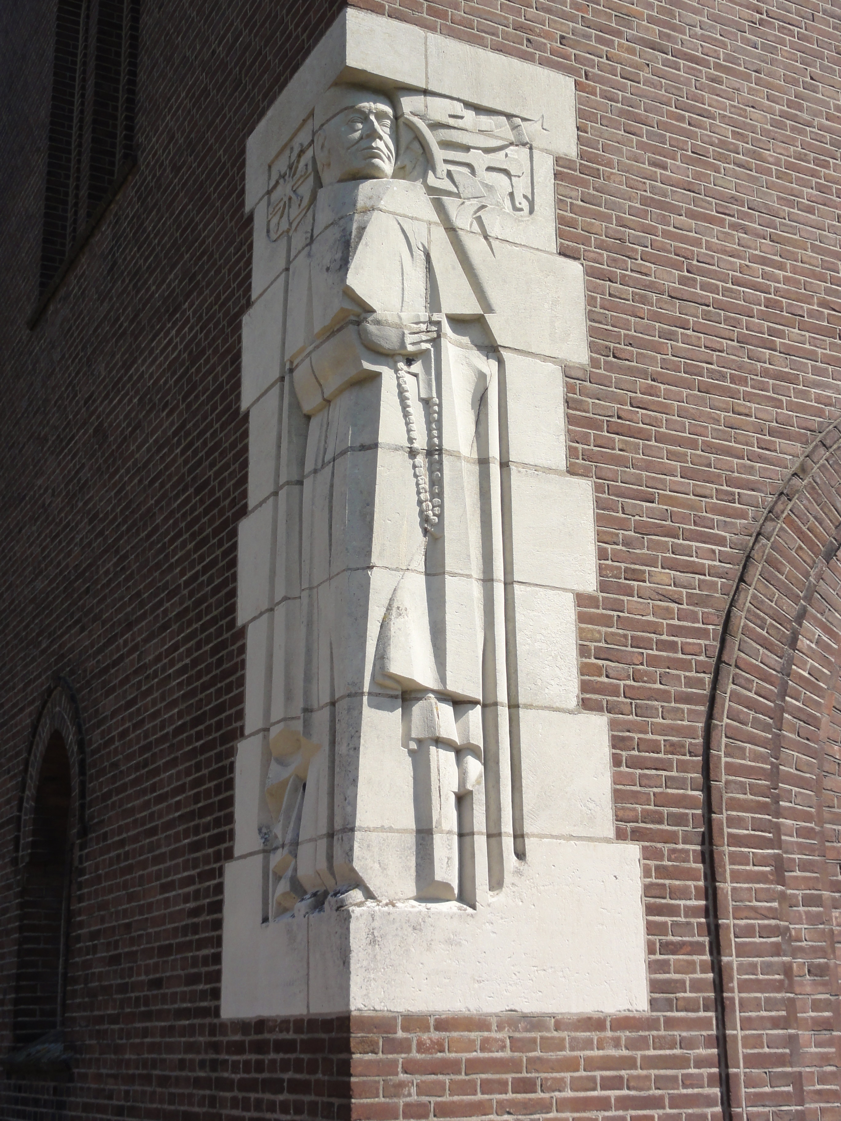 Heeswijk abdij Berne